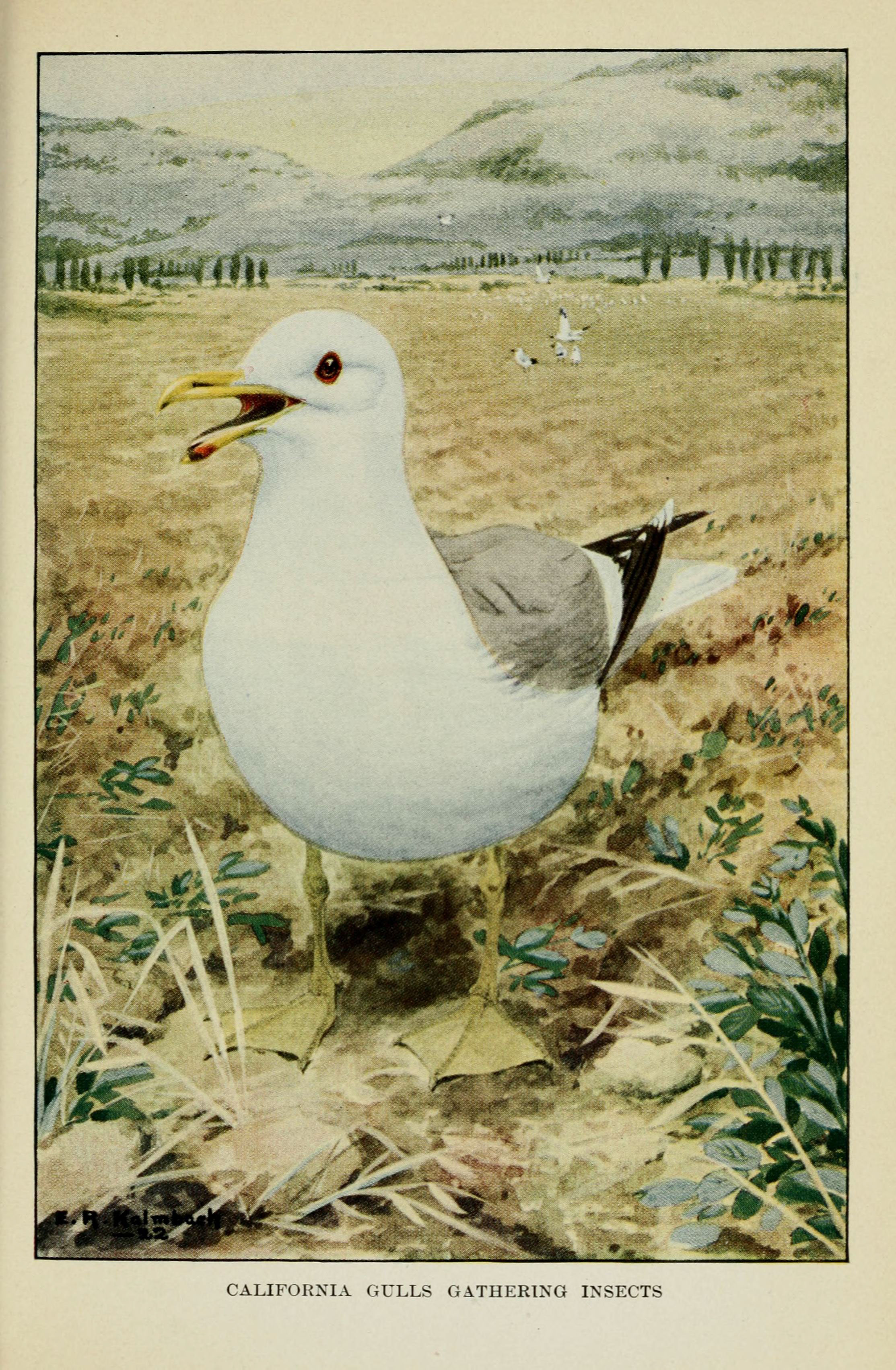 CALIFORNIA GULLS GATHERING INSECTS